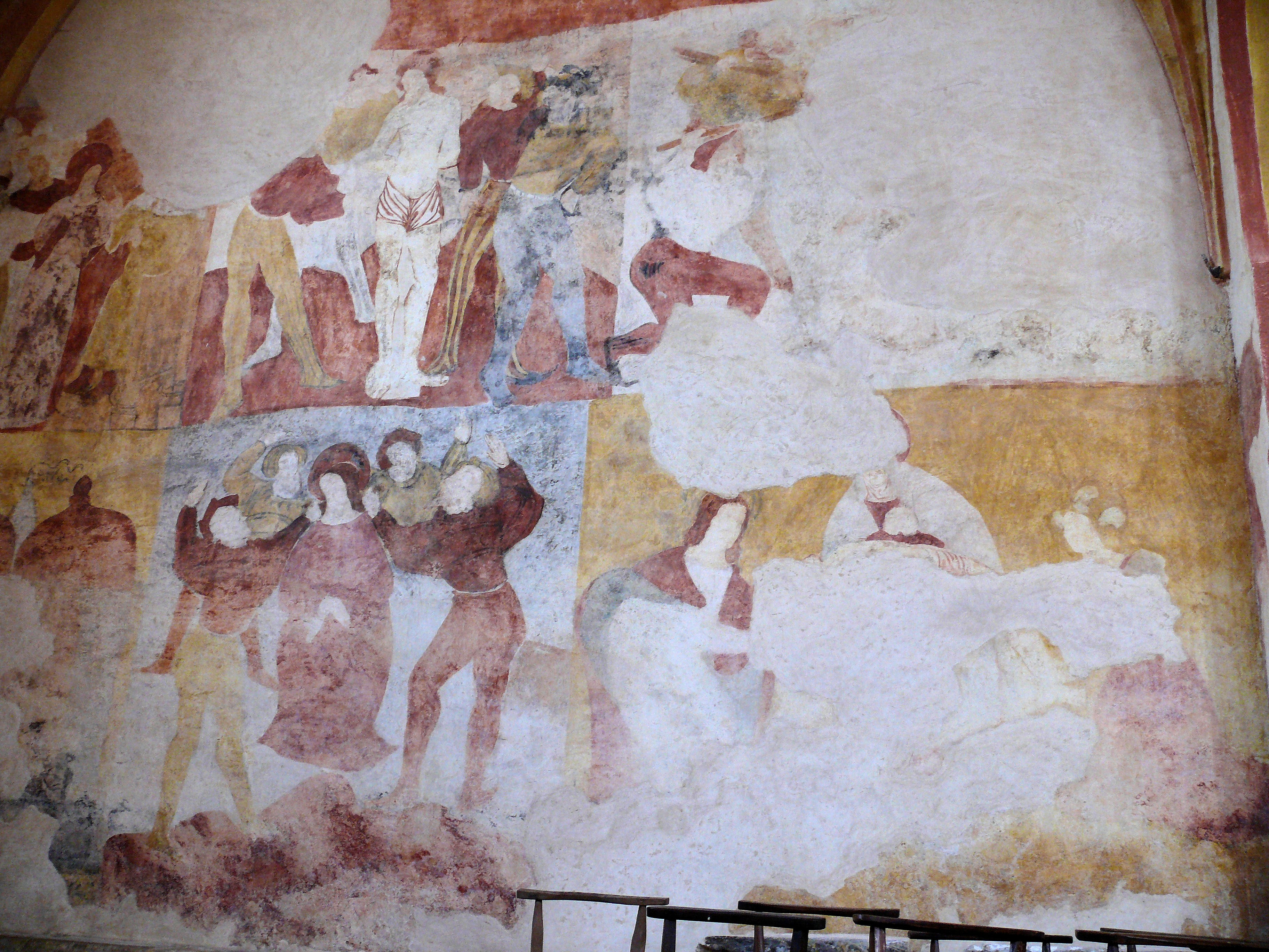 Besse - Eglise Saint-Martin - Peintures du mur ouest